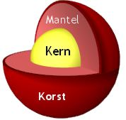 Binnenkant van Mars Gemaakt met Blender (To use this picture without labels, please contact Christiaan)